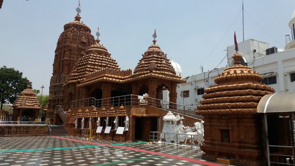 ଓଡ଼ିଆ: ହାଇଦ୍ରାବାଦସ୍ଥିତ ଜଗନ୍ନାଥ ମନ୍ଦିର